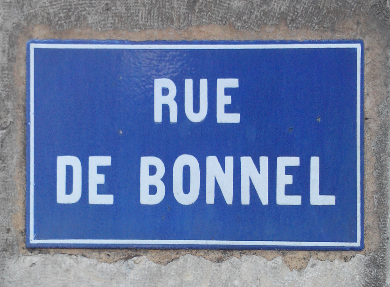 Plaque de la rue de Bonnel, dans le 3e arrondissement de Lyon.